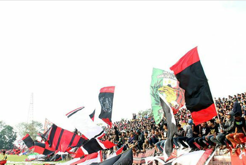 Suporter Persibat Batang